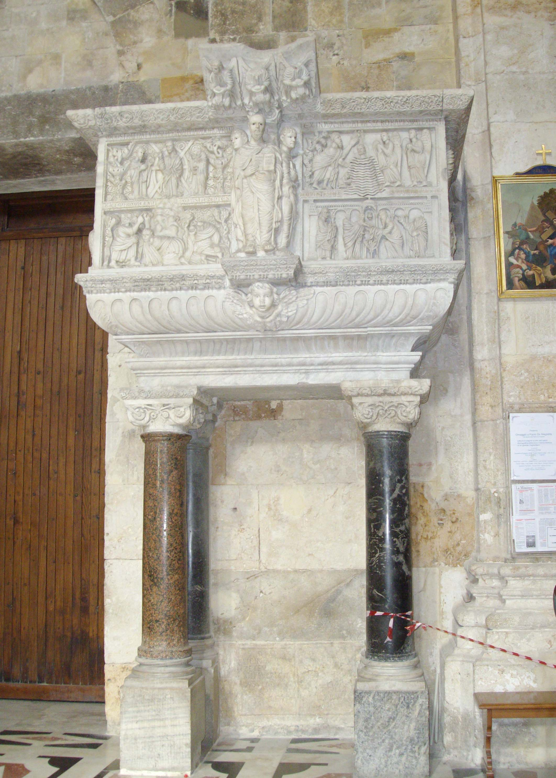 Ambone scolpito da maestro Guglielmo nel XII secolo per la cattedrale di Pisa, portato a Cagliari nel XIV secolo